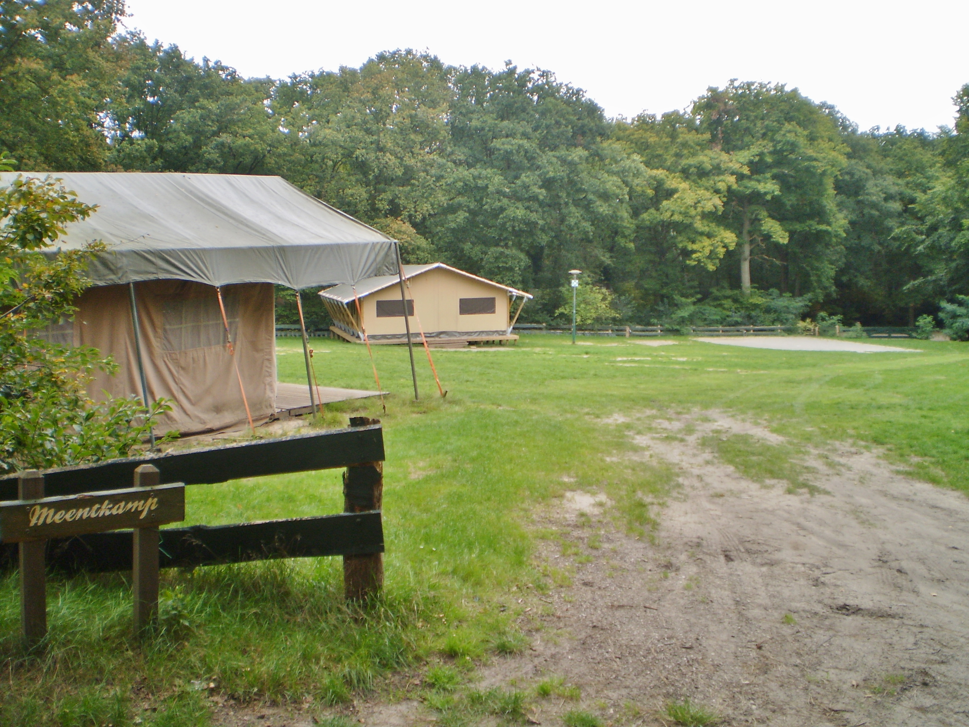 camping de Meentkamp bij de Woensberg